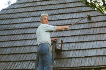 Šindelář ošetřující dřevěnou šindelovou střechu před povětrnostními vlivy, při rekonstrukci staré židovské márnice v Černovicích u Tábora